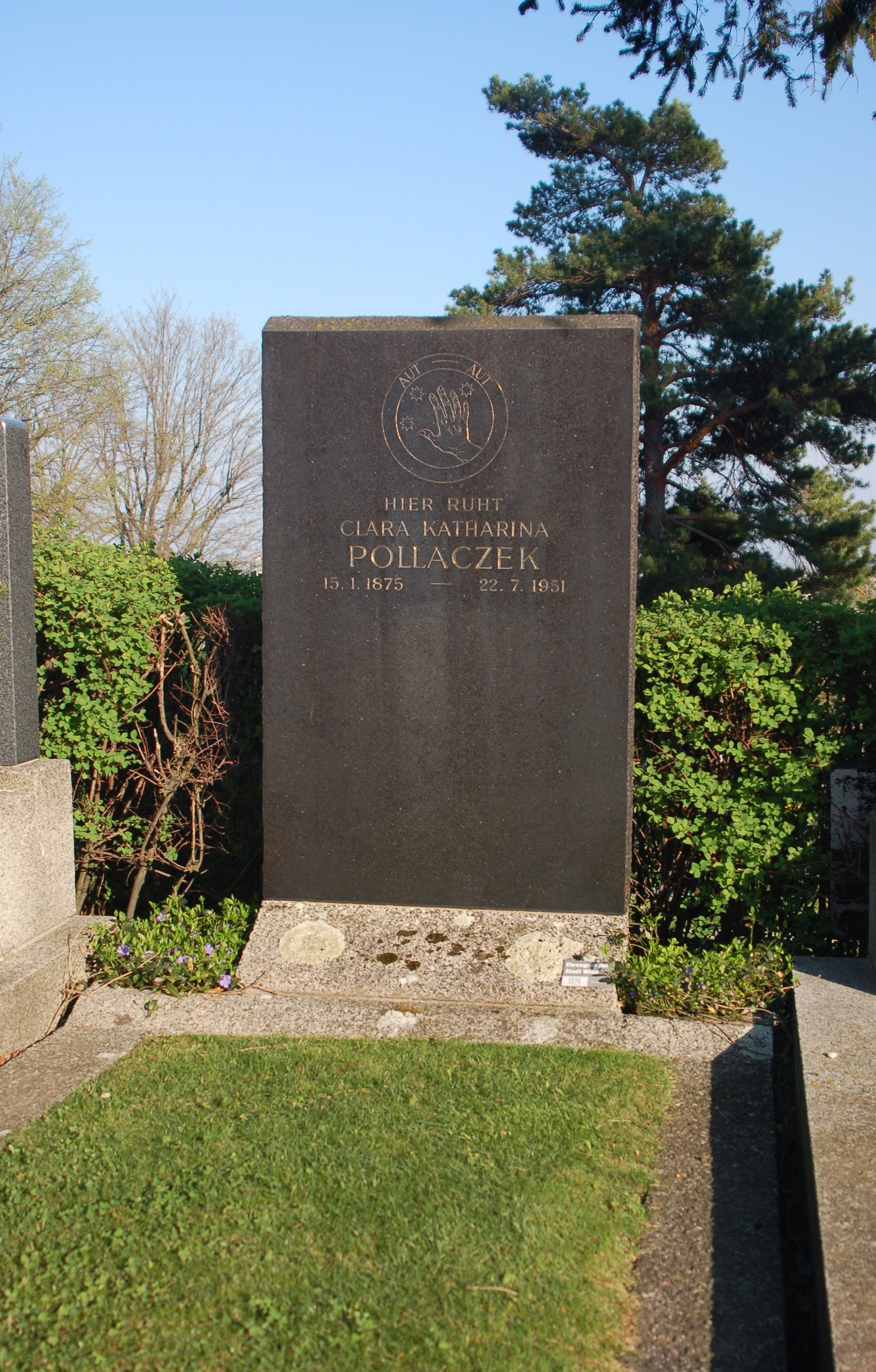 Sieveringer Friedhof, Grabstätte von Clara Pollaczek (Ehrengrab der Stadt Wien)